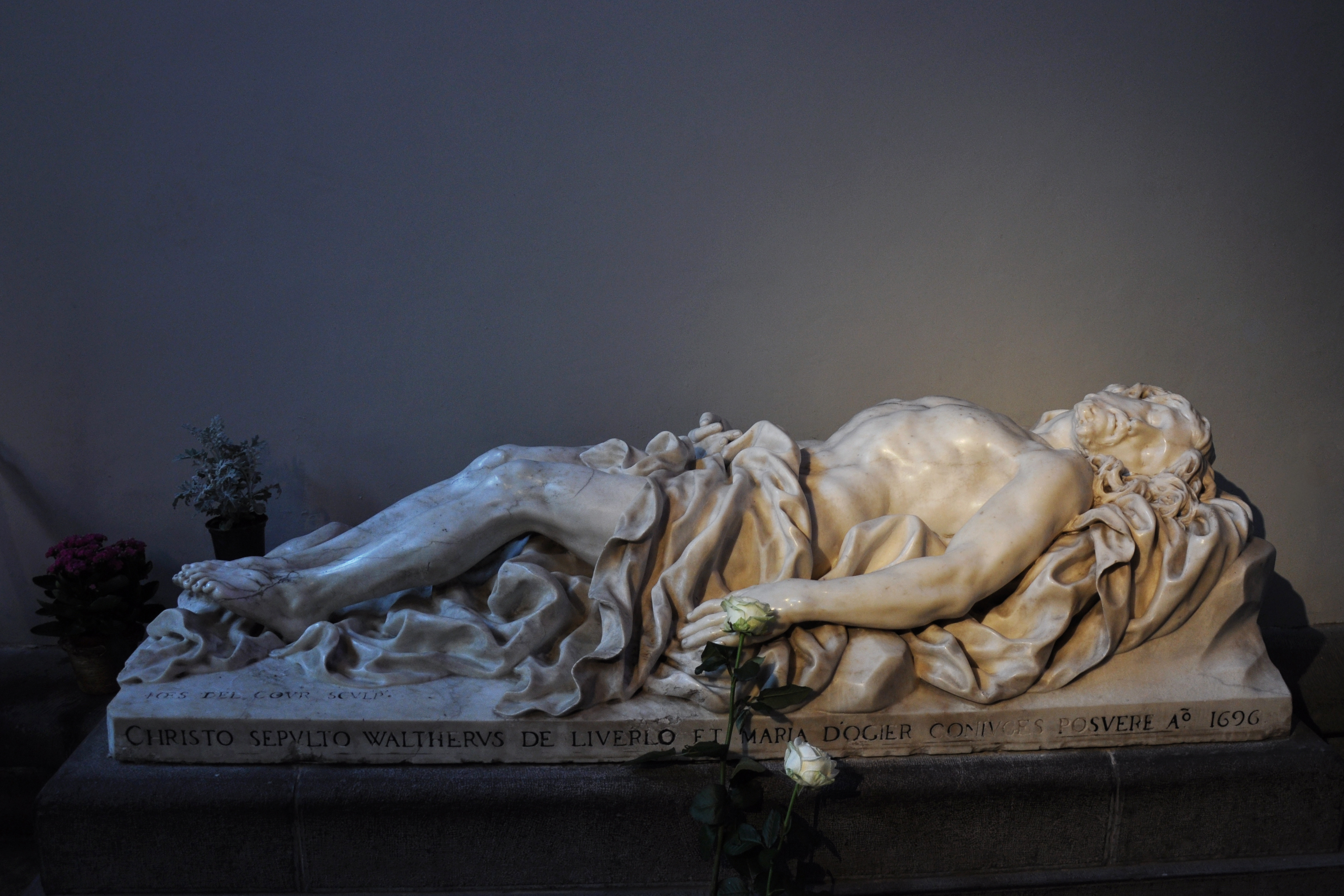 Cathédrale Saint-Paul de Liège: Christ gisant (1696) du monument funéraire de Walthère de Liverlo et de Marie d'Ogier, provenant de l'église (disparue) des Sépulcrines, dite des Bons-Enfants, à Liège; oeuvre de Jean Del Cour (1631-1707).